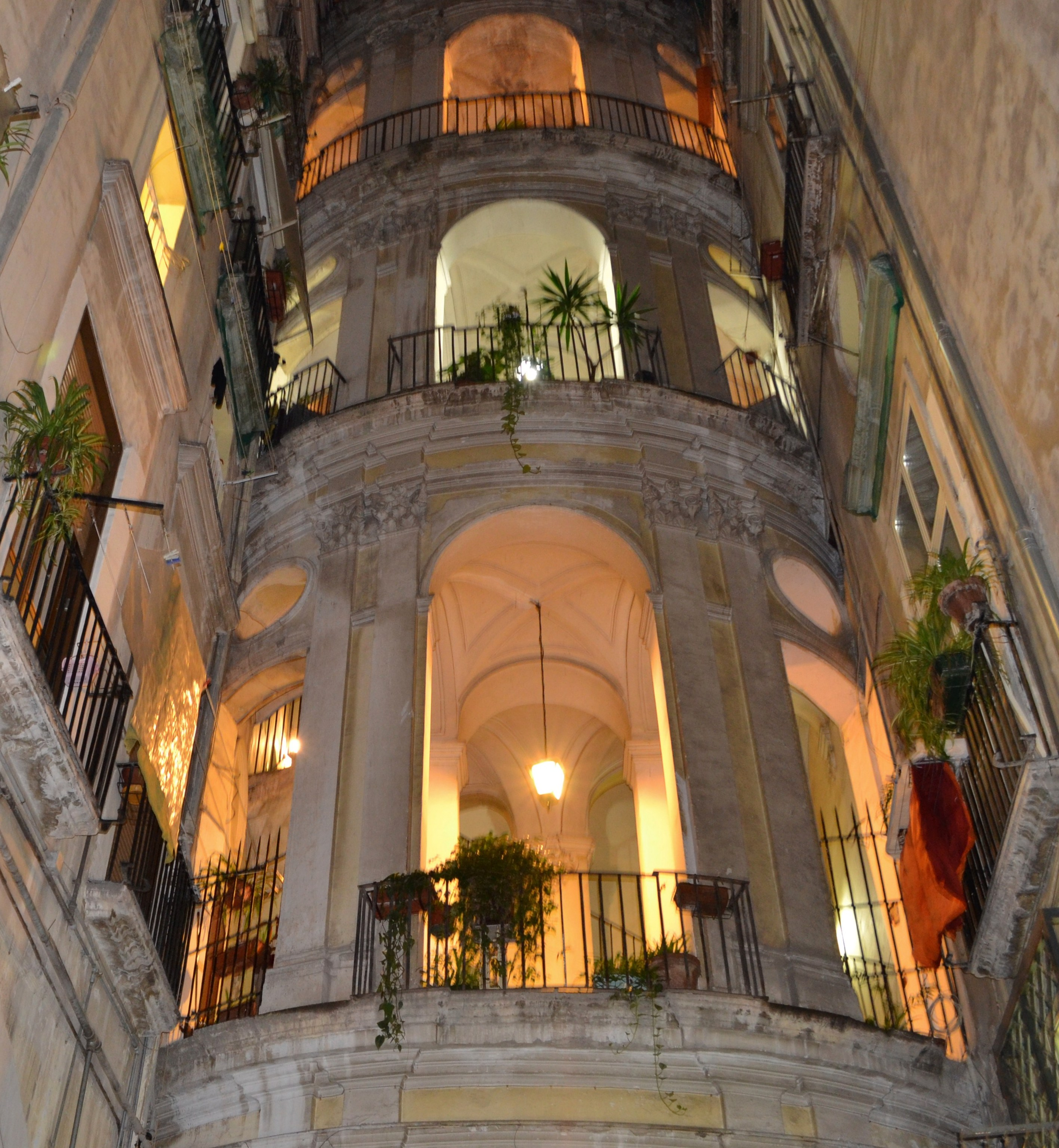 Palazzo D'Afflitto, Napoli Via Nilo, 30.